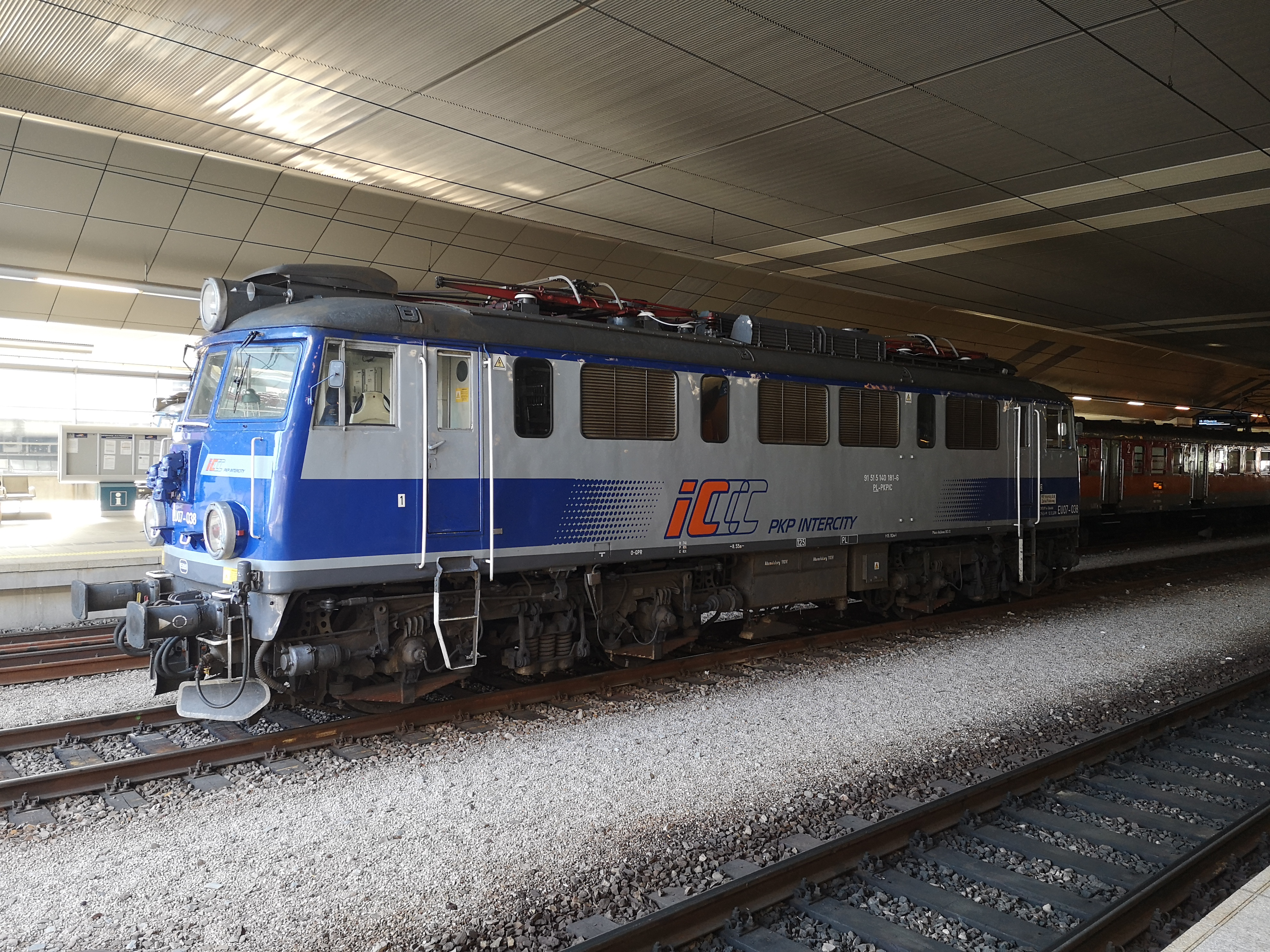 EU07-038 na Dworcu Głównym w Krakowie